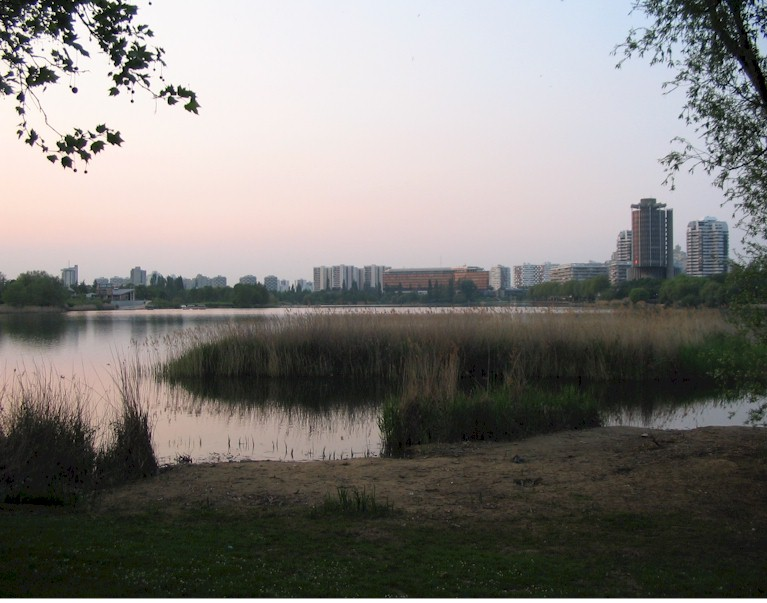 Vue du lac de Créteil (Val-de-Marne). L'Hôtel de ville à droite, la préfecture au centre, les choux et le palais de justice à gauche. Source : photo personnelle (Clio64). Catégorie:Créteil